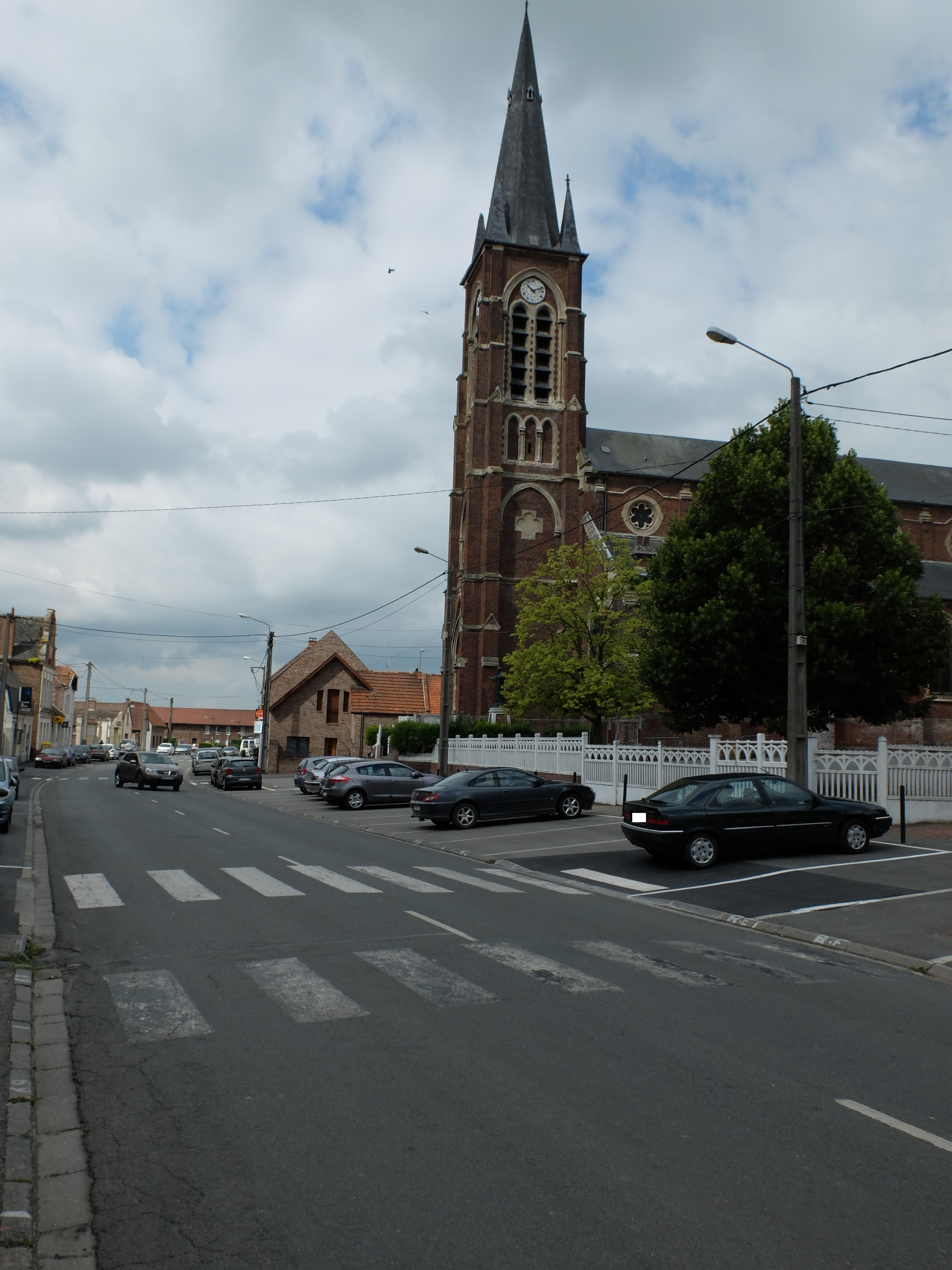 Vue de la rue Henri Barbusse d'Écourt-Saint-Quentin. L'église Saint-Quentin est visible.